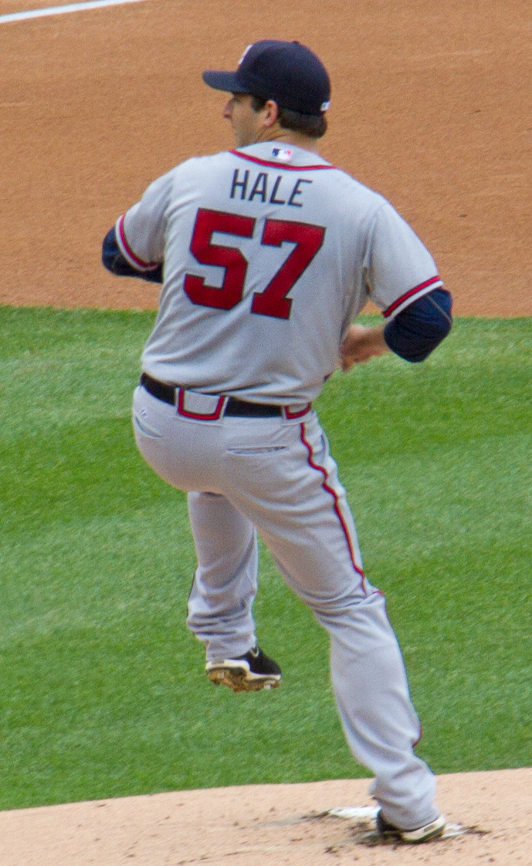 David Hale